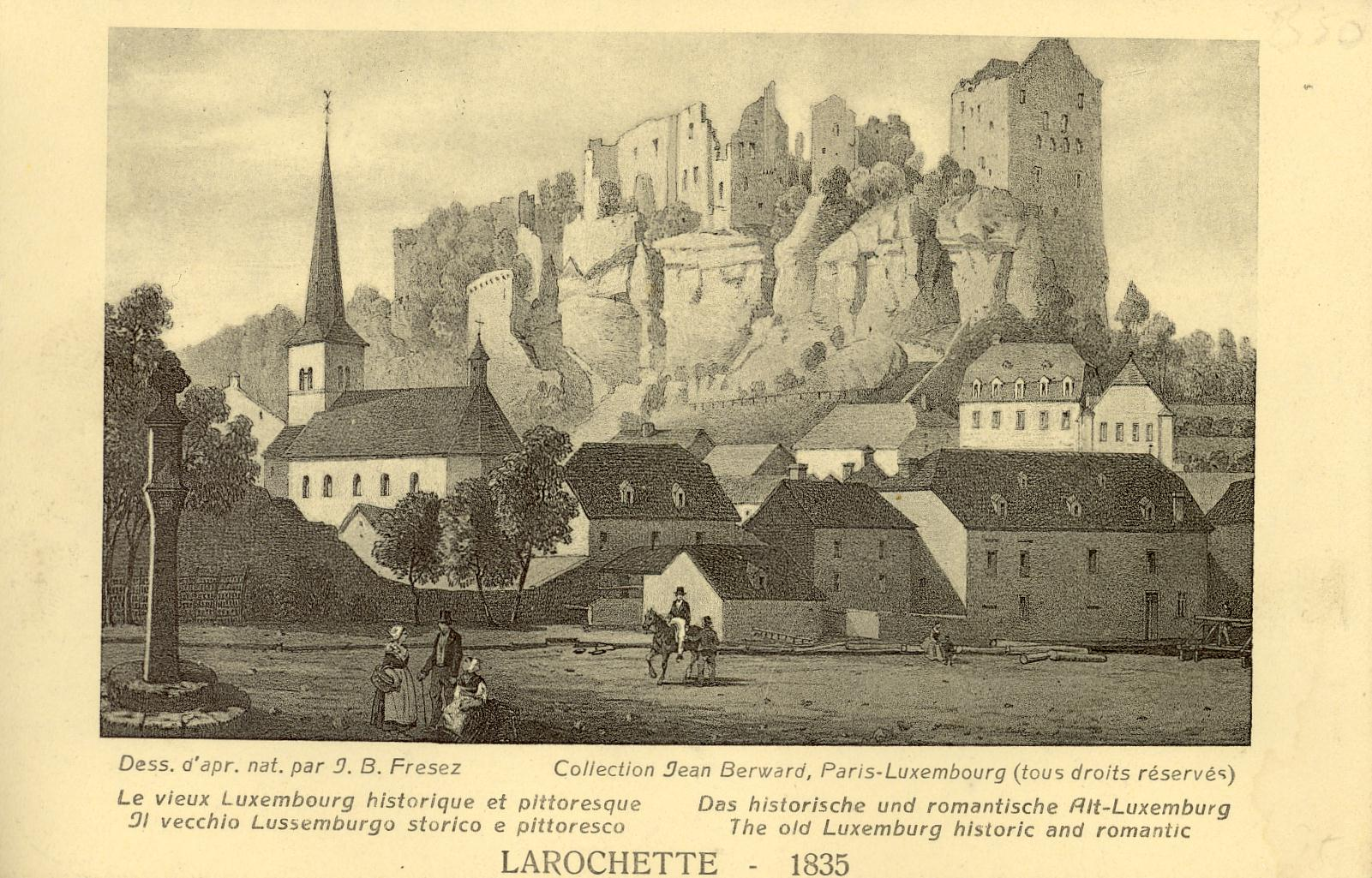 Scan vun enger Postkaart déi dem Menhir gehéiert, dee se eropgelueden huet.